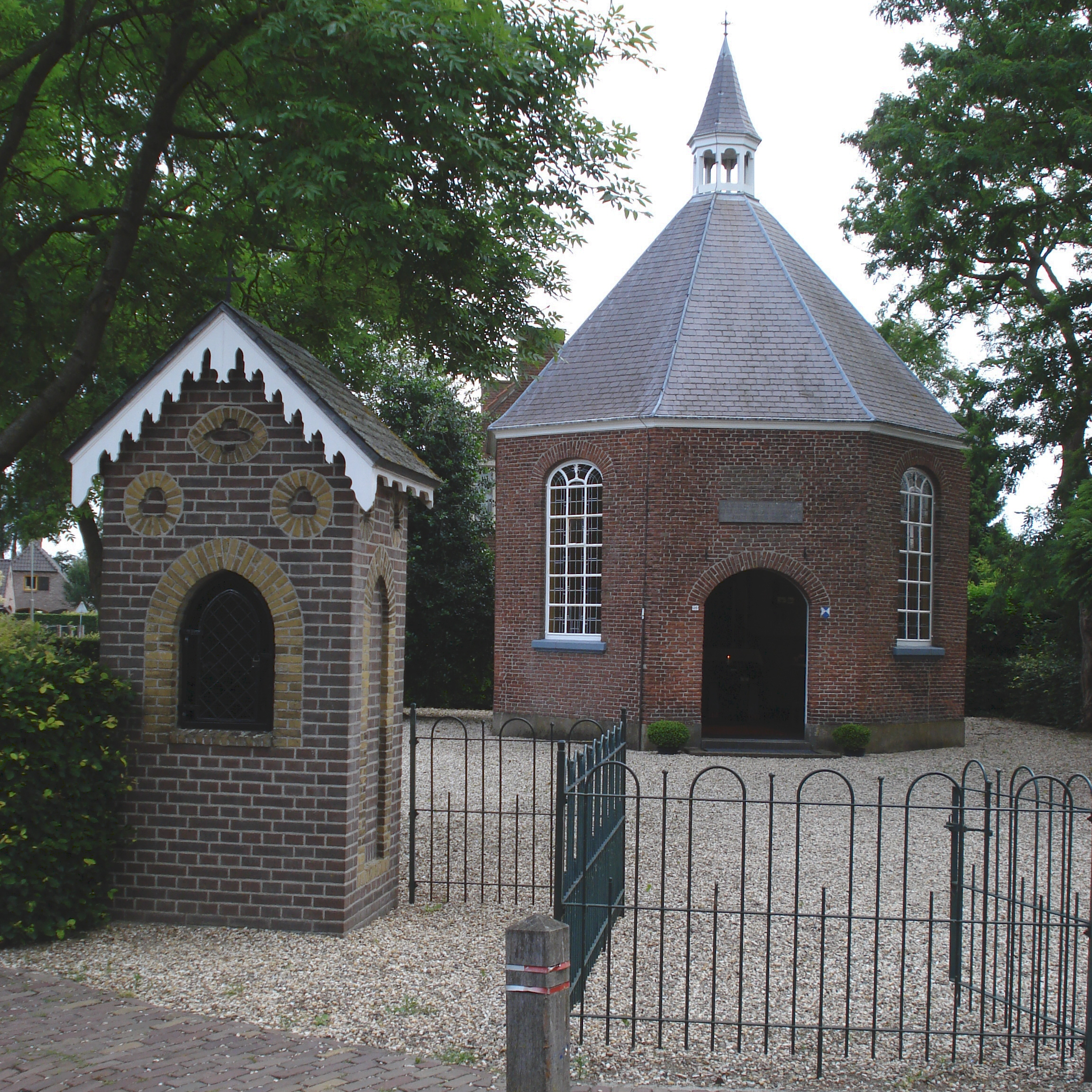 Deursen, chapelle Saint Roch